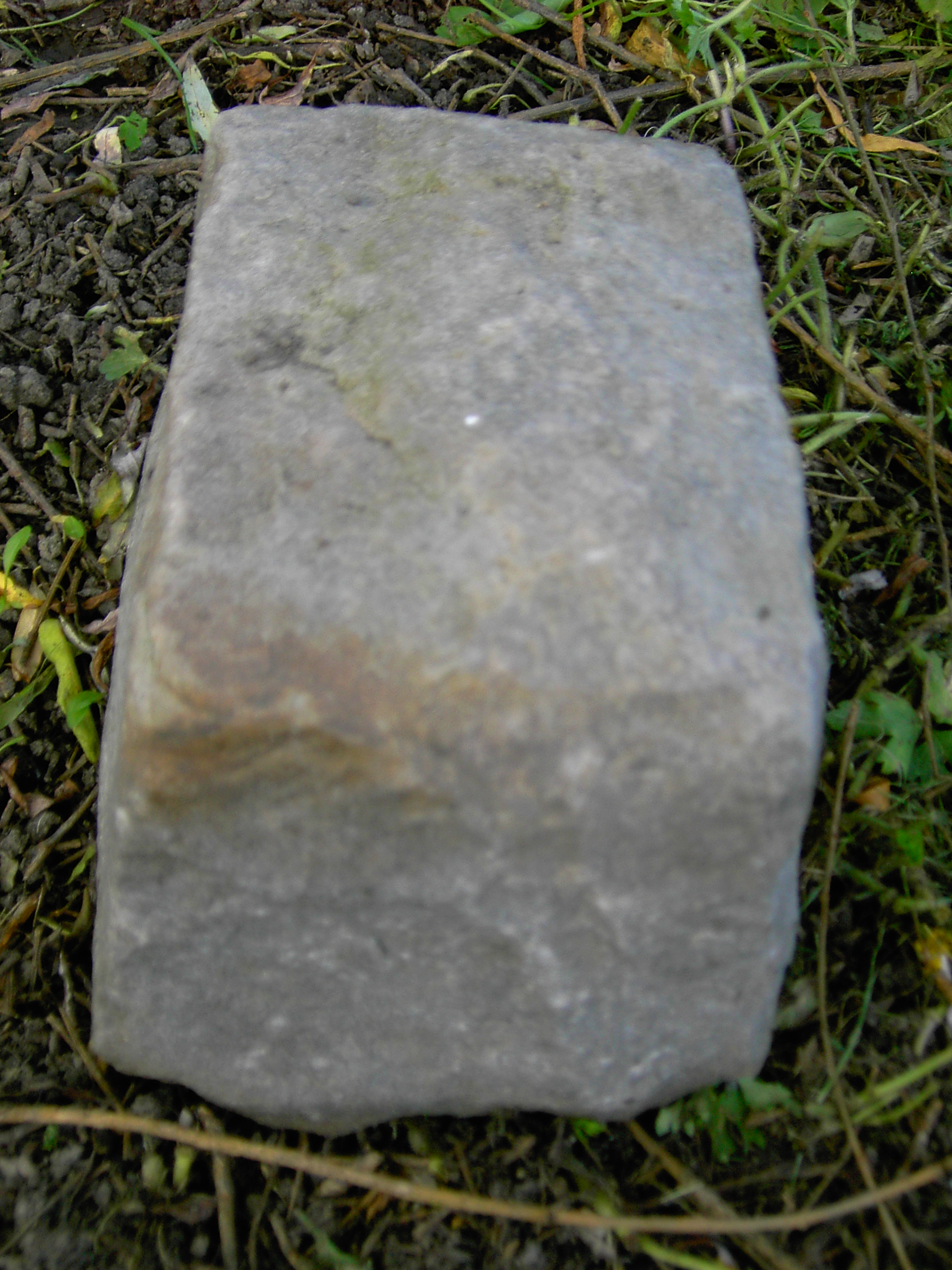 image personnelle